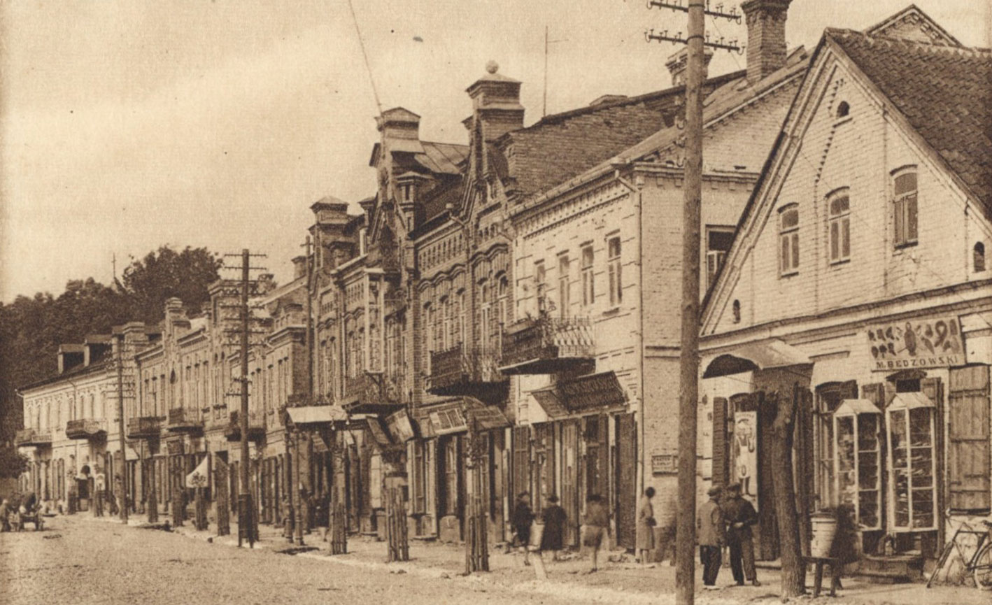 Беларуская (тарашкевіца): Ліда (Lida), вуліца Віленская (vulica Vilenskaja)